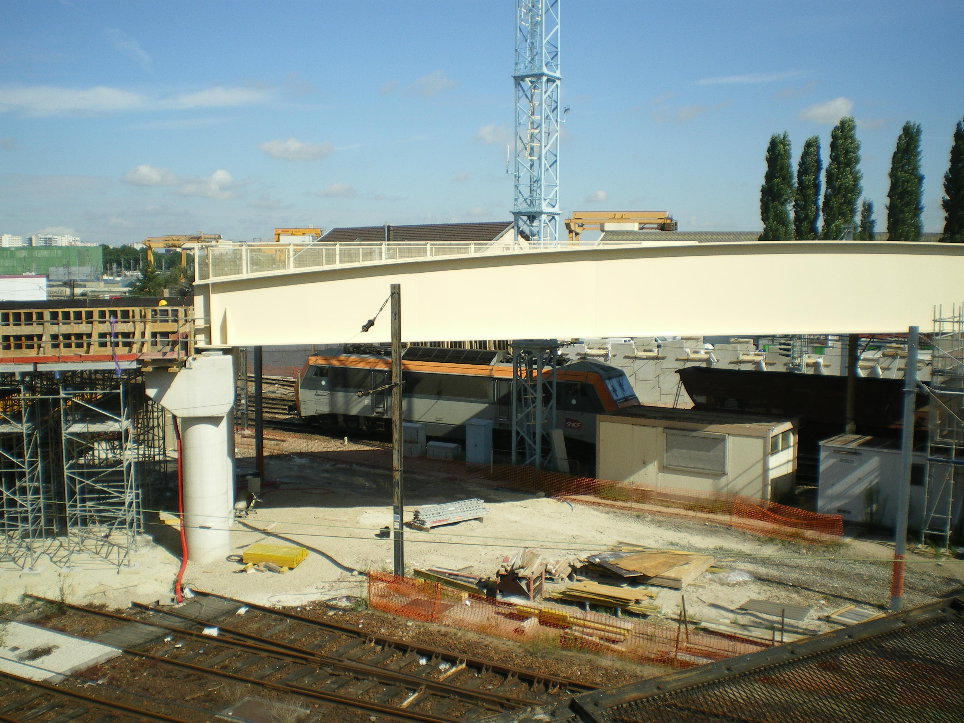 Tangentielle Nord - Noisy-le-Sec - Chantier de l'atelier d'entretien